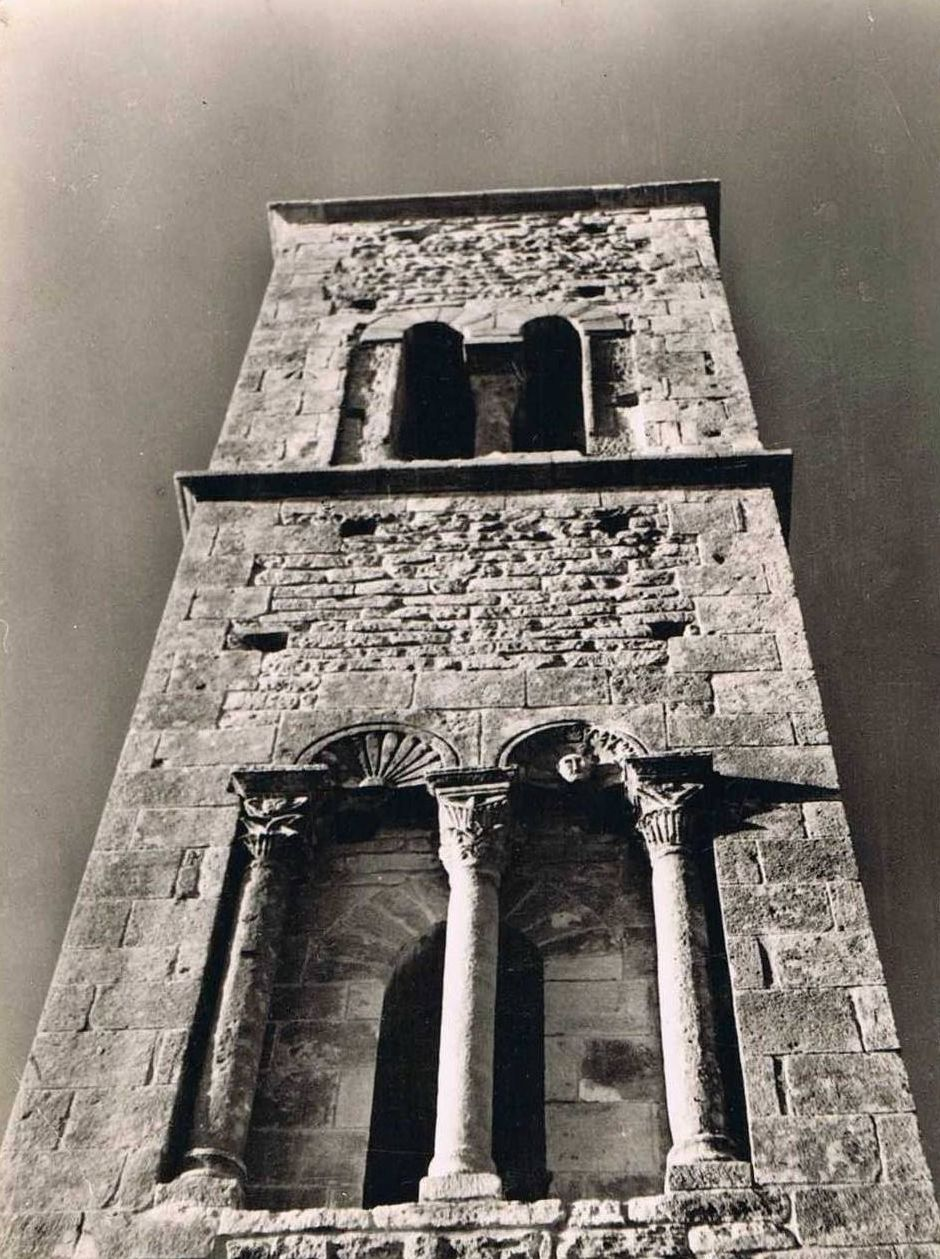 La tour du priieuré de Saint-Symphorien de Bonnieux en 1900